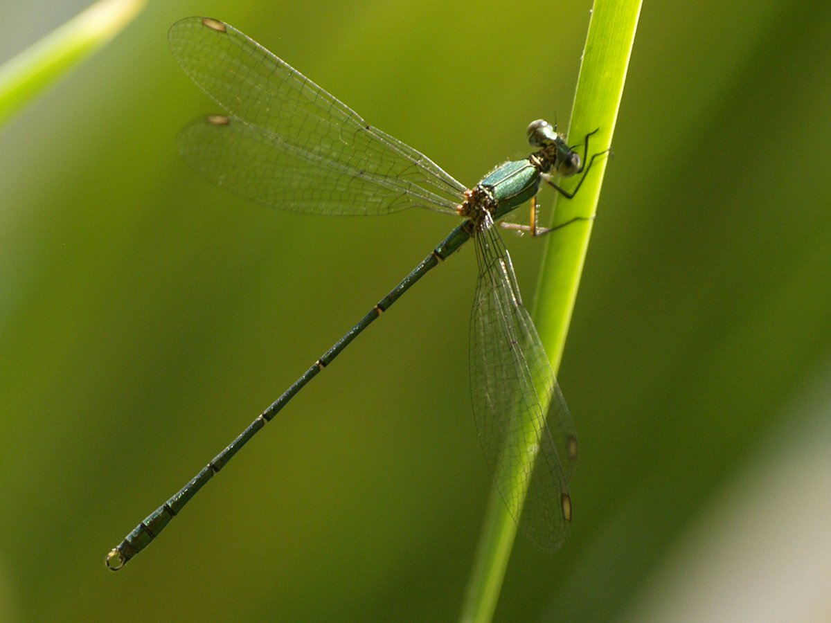 Lestes viridis mascle